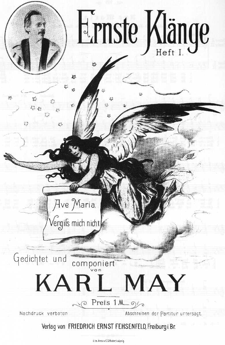 Ernste Klänge. Gedichtet und compomiert von Karl May. Freiburg i. Br. 1898